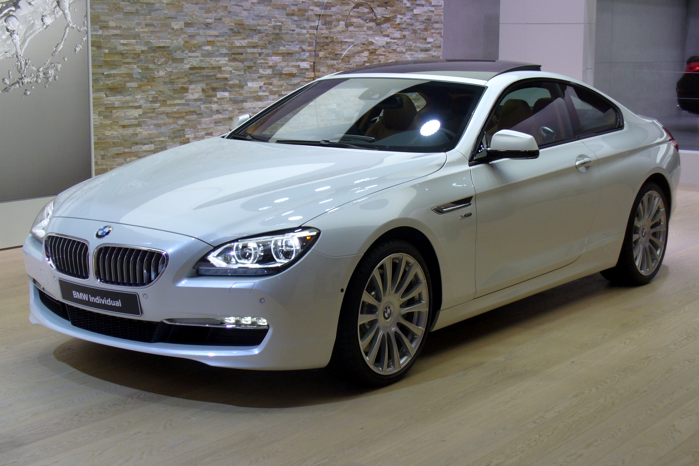 BMW 650i xDrive Coupé